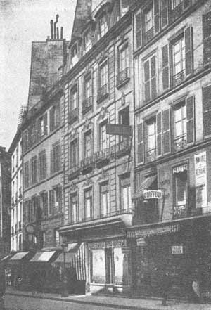 Maison natale d'Eliphas Lévi au nº5 de la rue des Fossés-Saint-Germain-des-Prés (actuelle rue de l'Ancienne-Comédie).